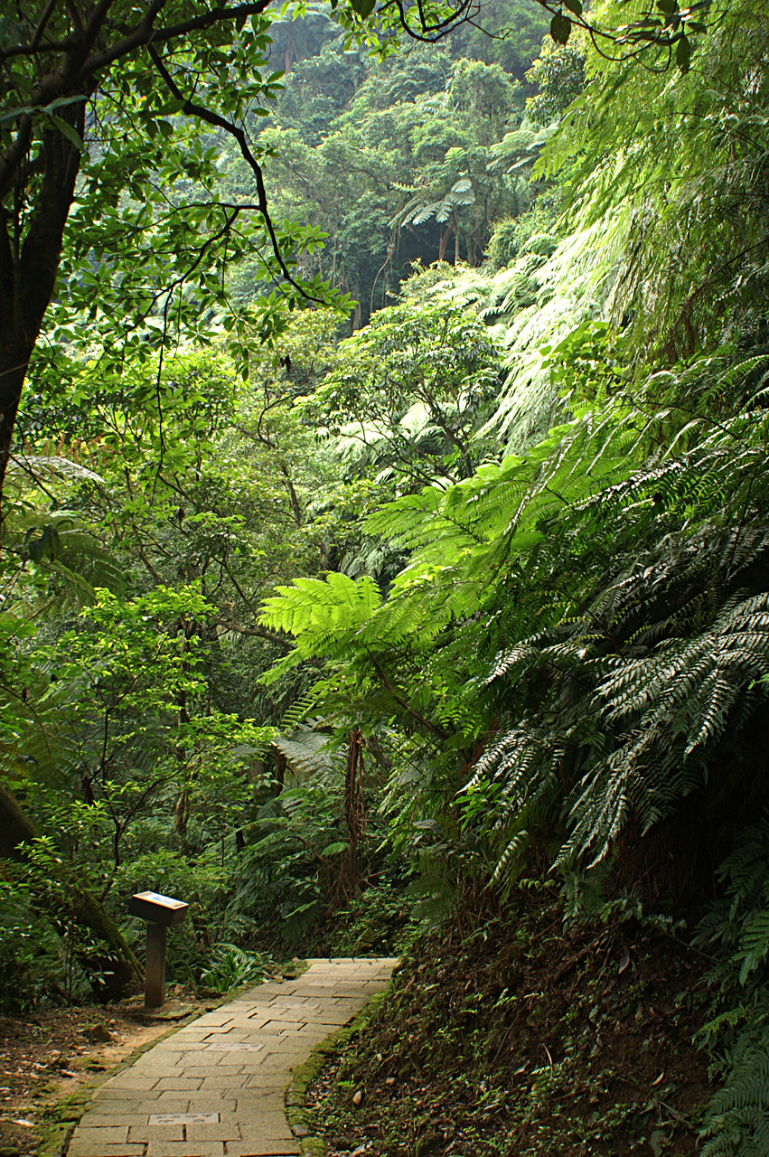 臺北市象山林相。